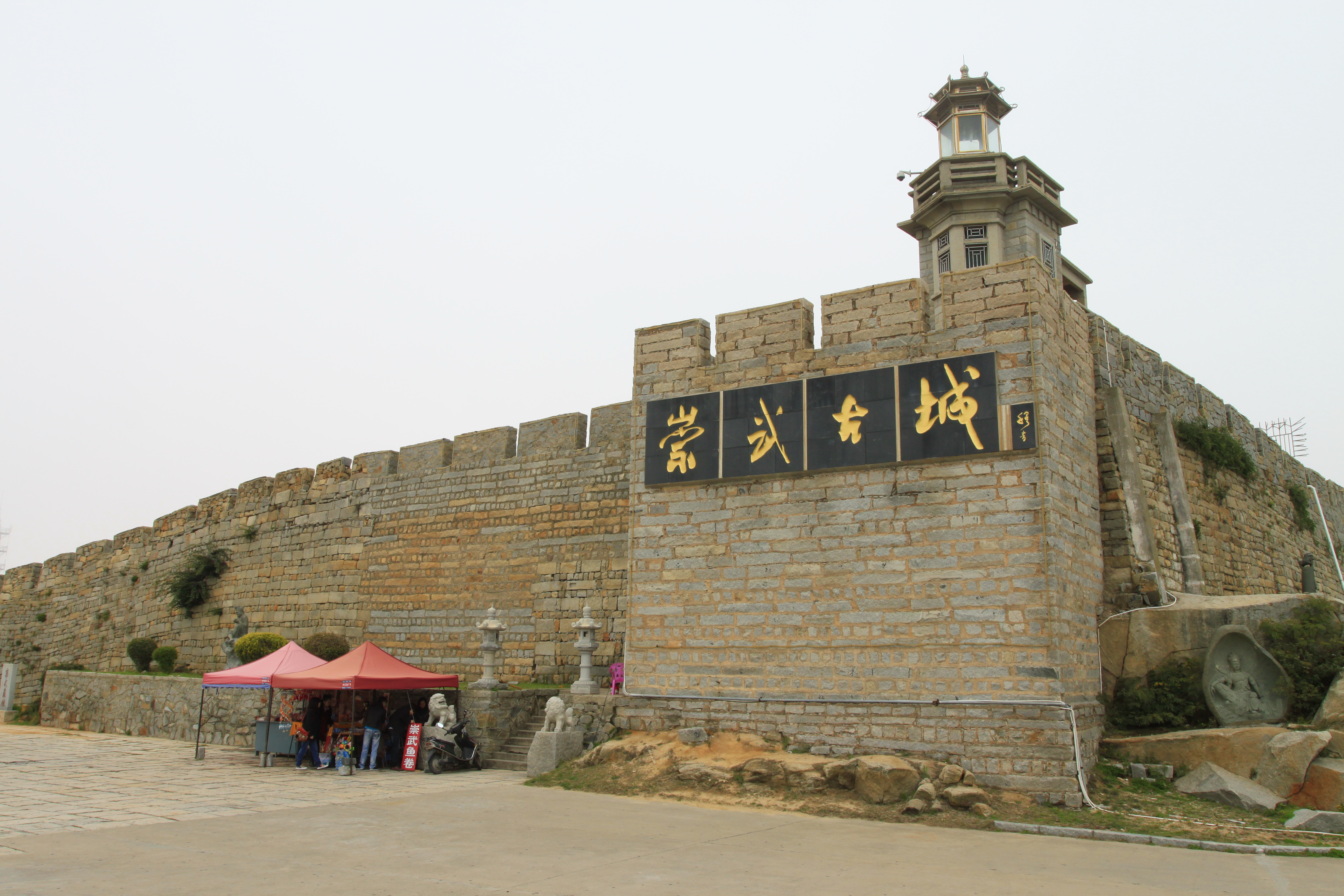 崇武城，位于中国福建省惠安县，是全国重点文物保护单位。